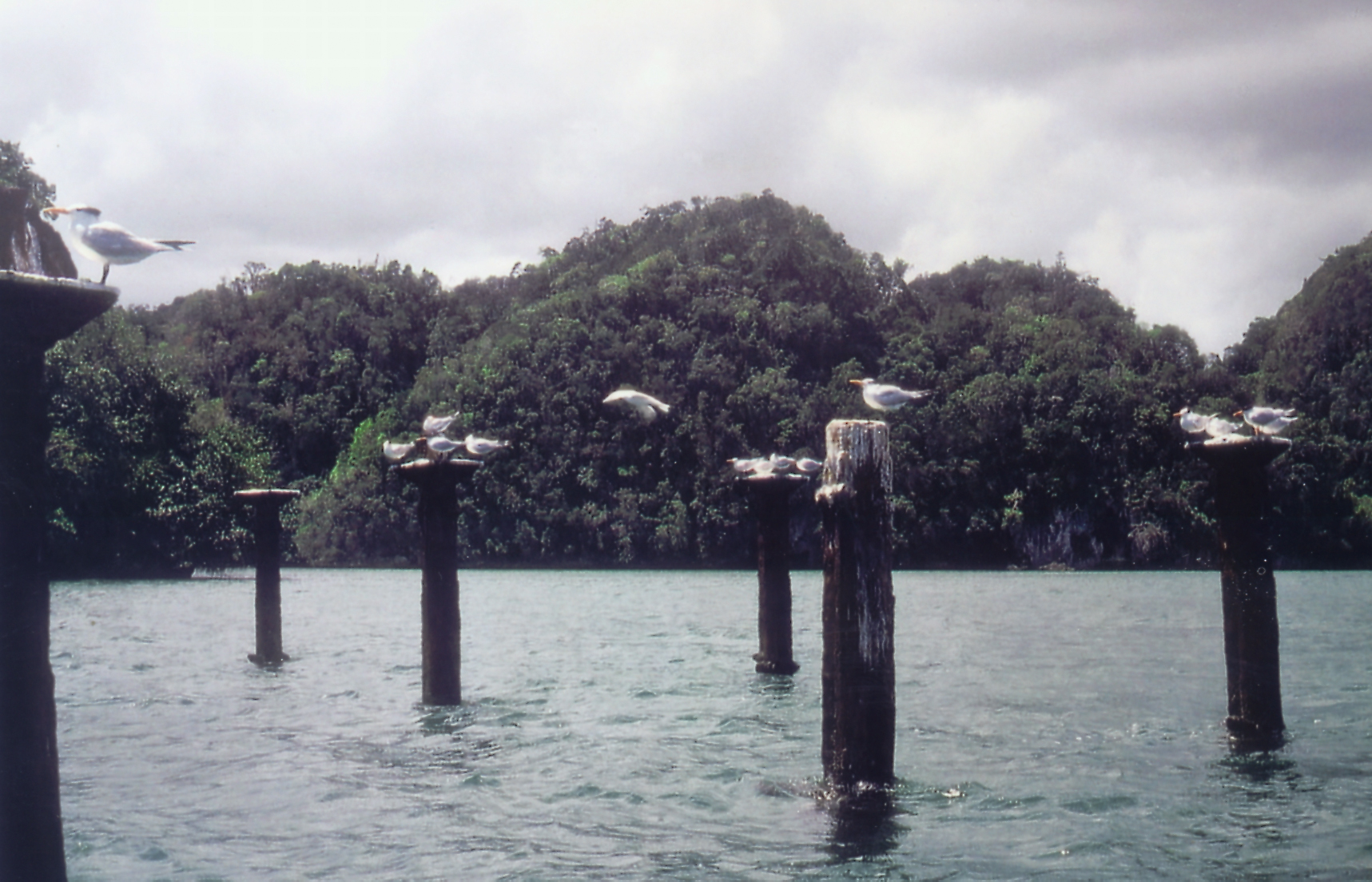 Nationalpark Los Haitises, Dominikanische Republik: Relikte einer ehemaligen Hafenanlage in der Bahia de San Lorenzo, Königsseeschwalben; Im Hintergrund so genannte "Mogotes", Karsthügel.